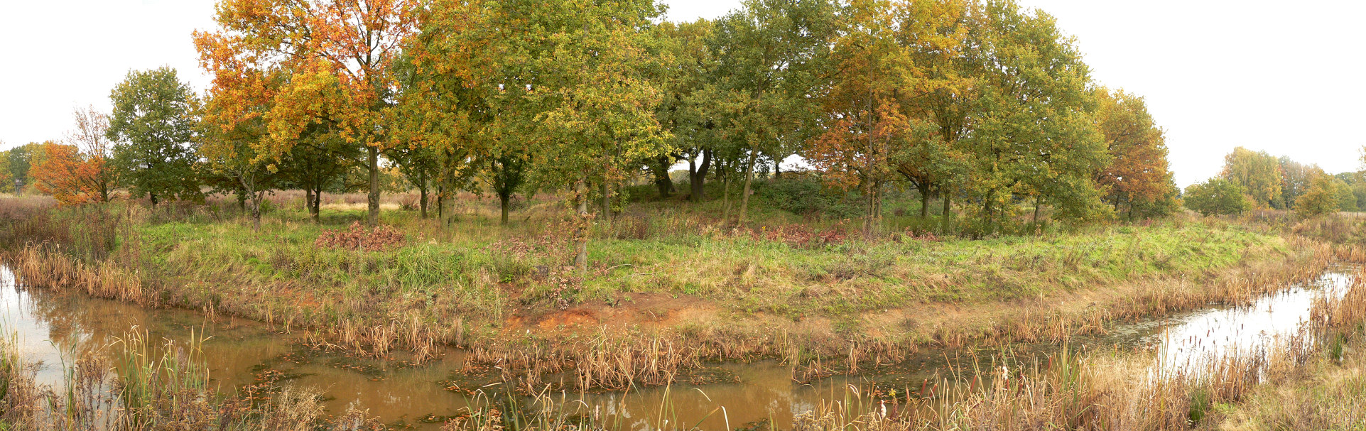 Borwall